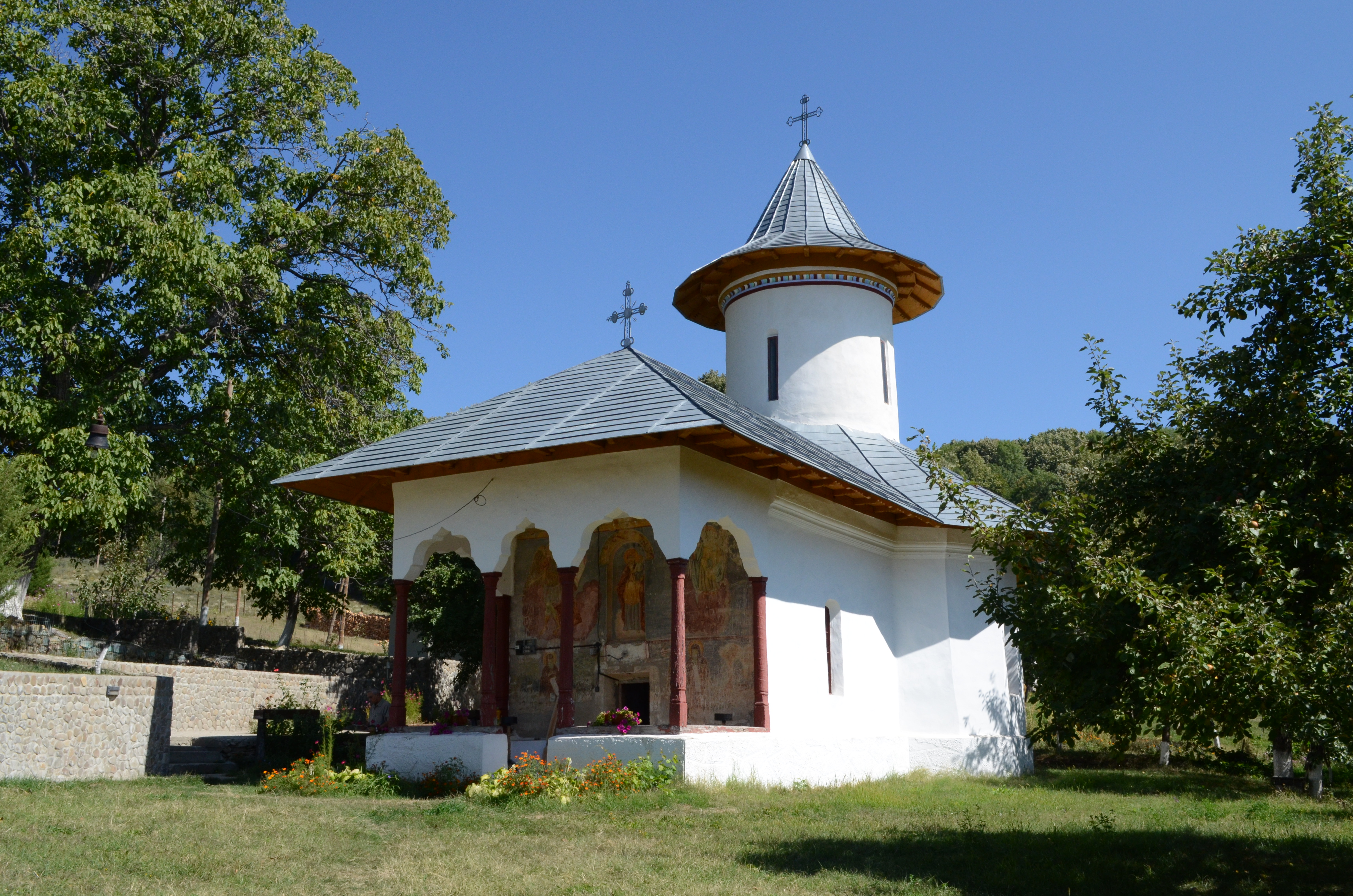 Biserica "Sf. Arhangheli Mihail și Gavril" a Mănăstirii Cârnu, Buzău